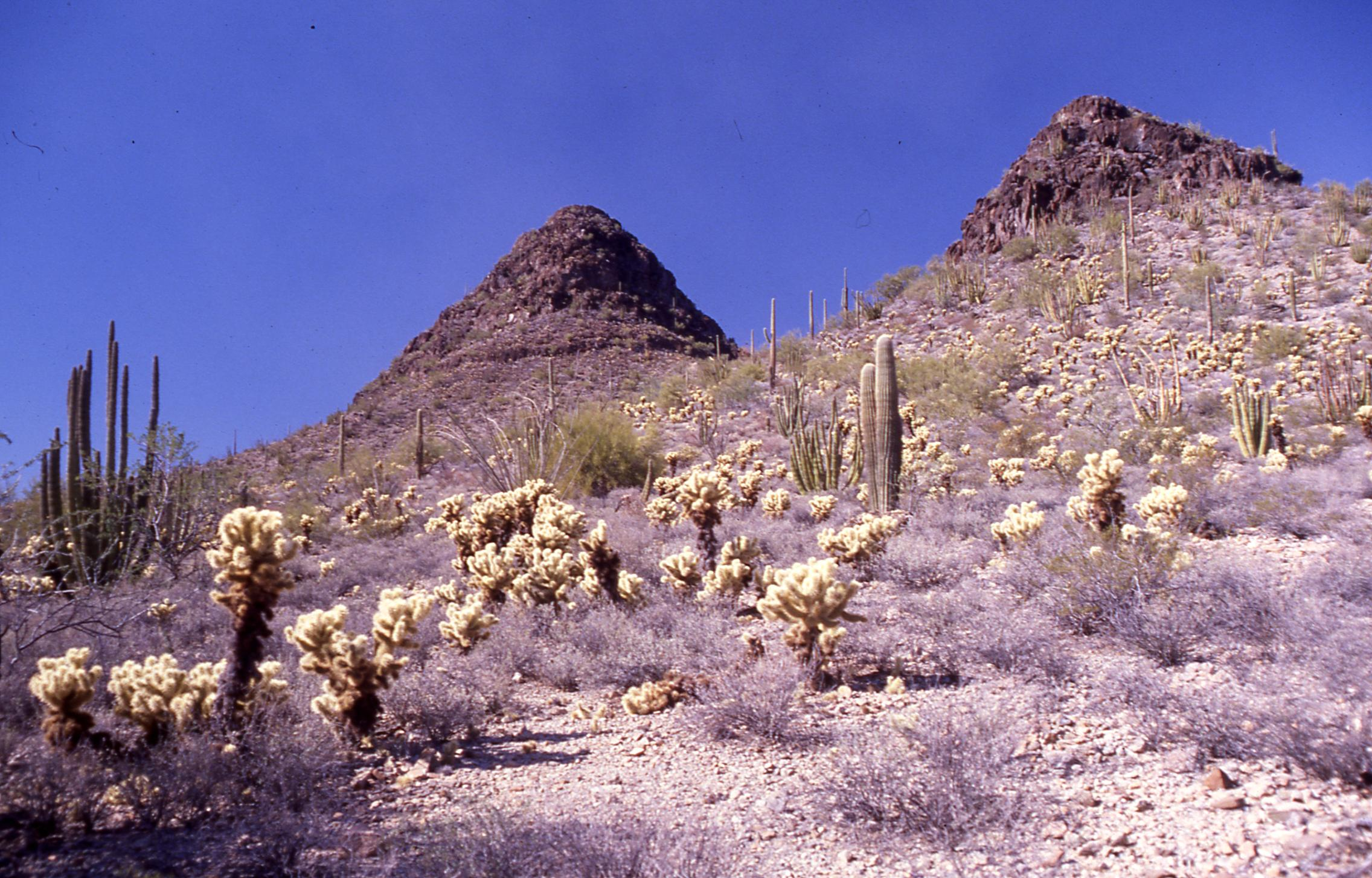 Die Zwillingsberge (Twin peaks) in den Ajo Mountains. An ihrem Hang wachsen verschiedene Kakteenarten.